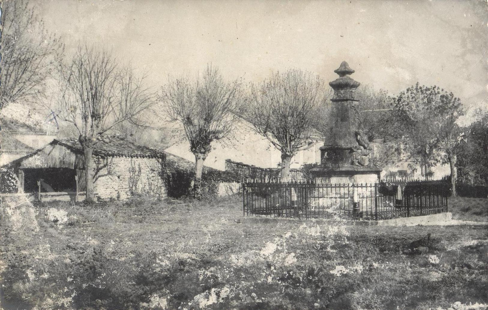 Photo du monument aux morts de la commune de Saint-Pardoult (Charente-Maritime)